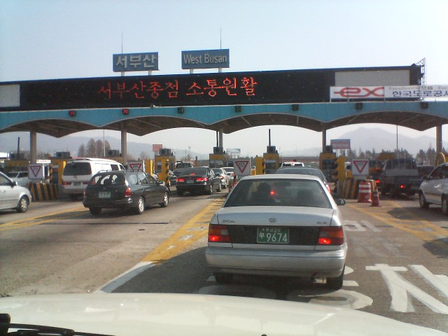 남해제2고속도로지선 서부산 톨게이트.